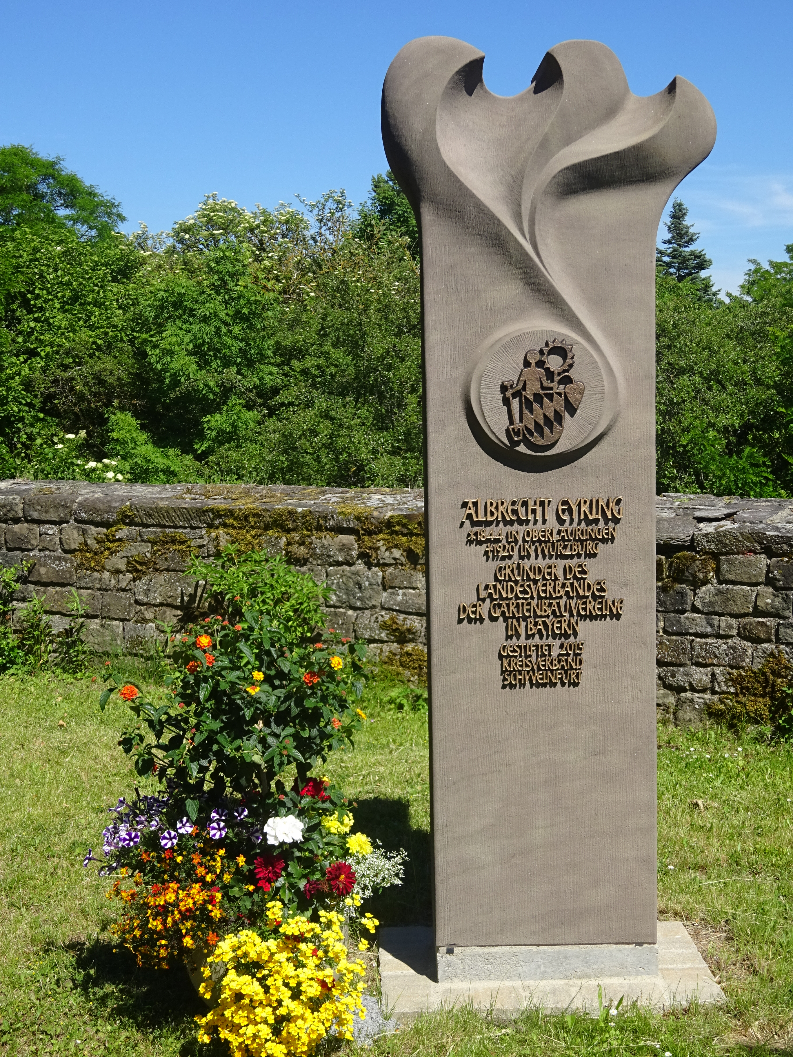 Werk von Peter Vollert